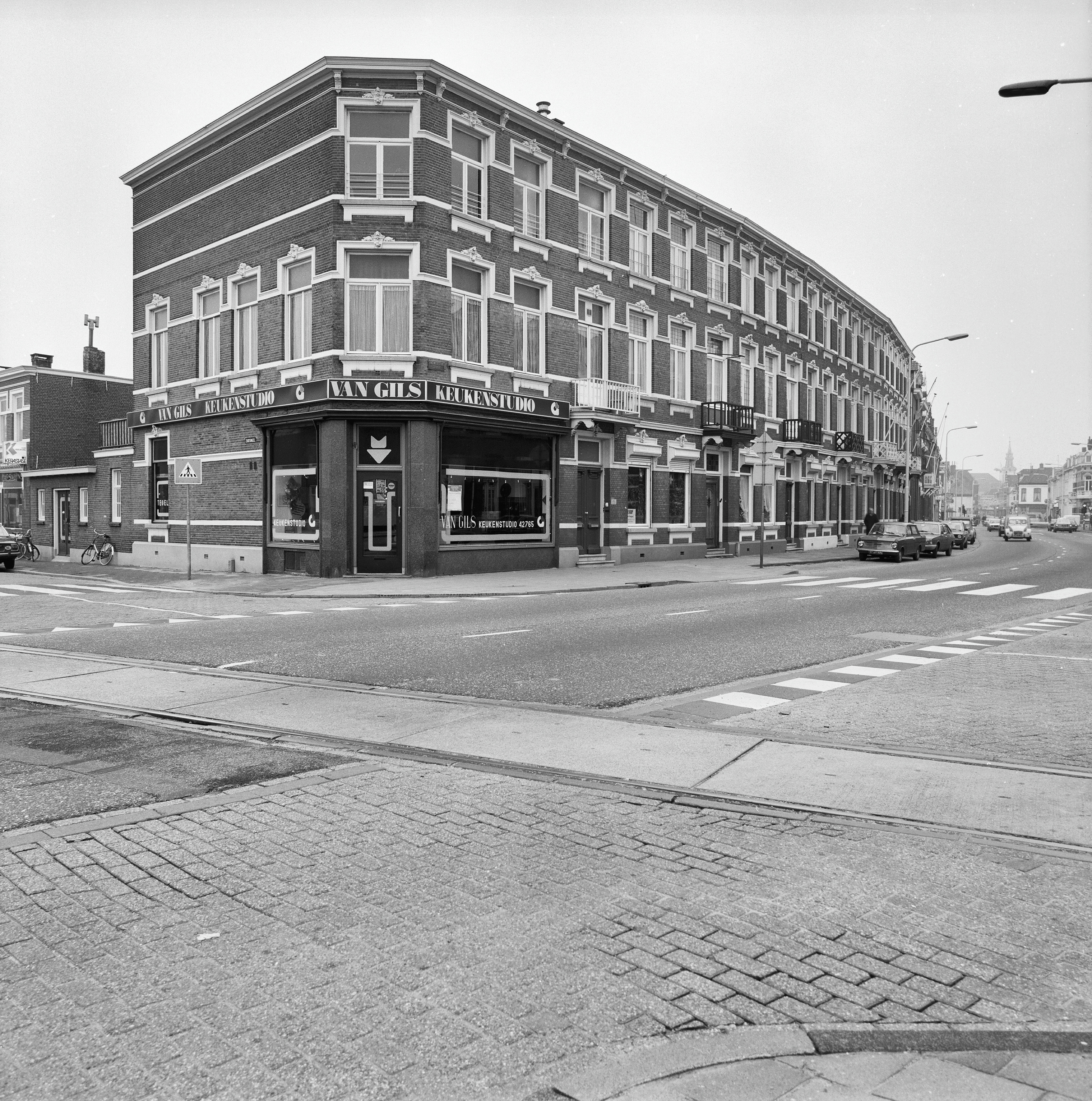 hoek Zuidsingel